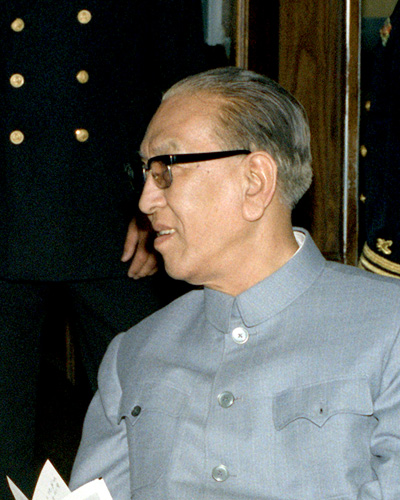 Geng Biao (耿飚), chinese diplomat, vice premir